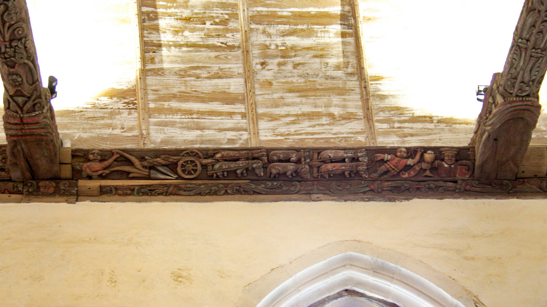 Église Saint-Salomon de La Martyre, scène de labour (Isidore le laboureur) (Classé) .